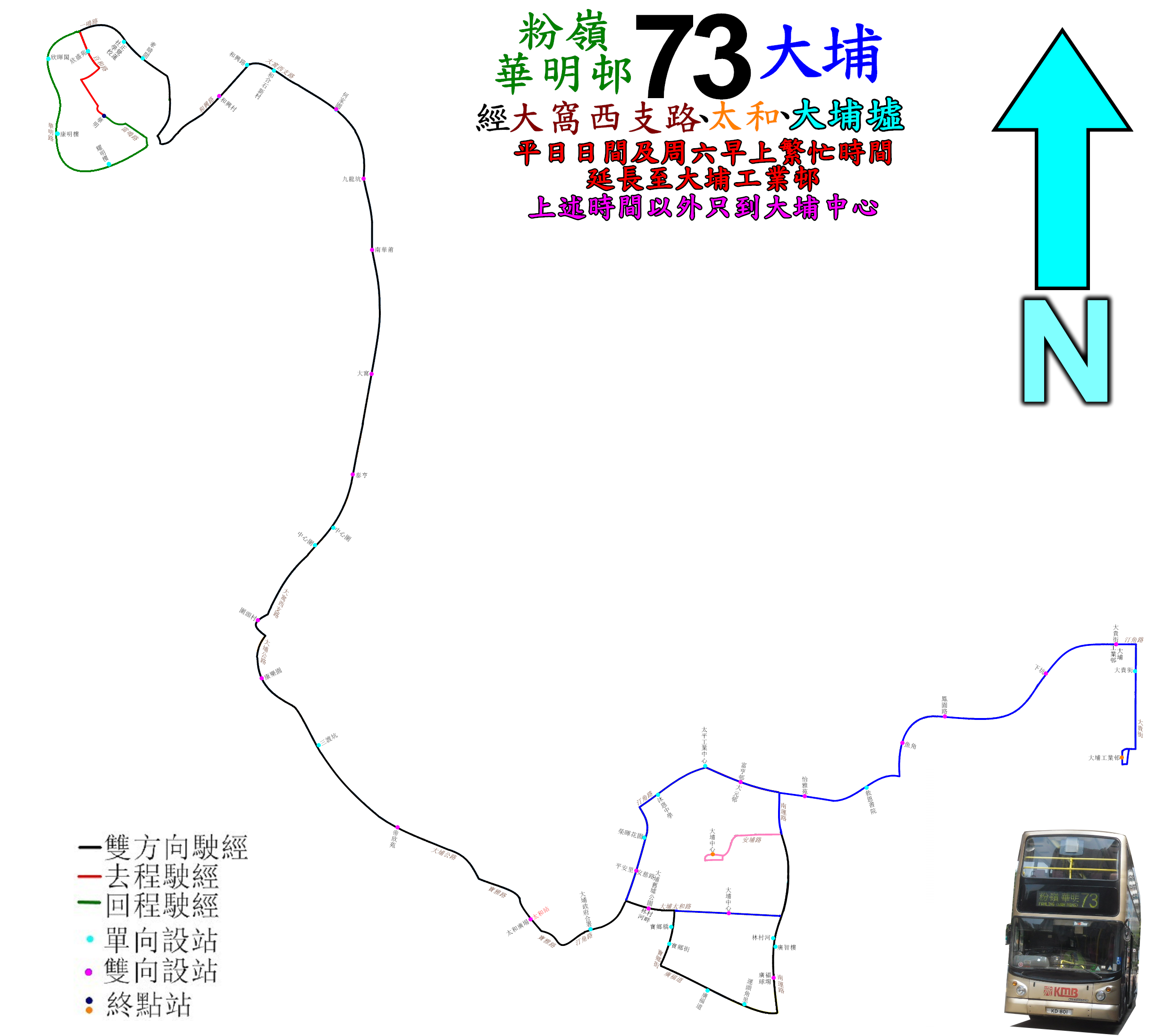 中文（香港）: 九巴73線的走線圖